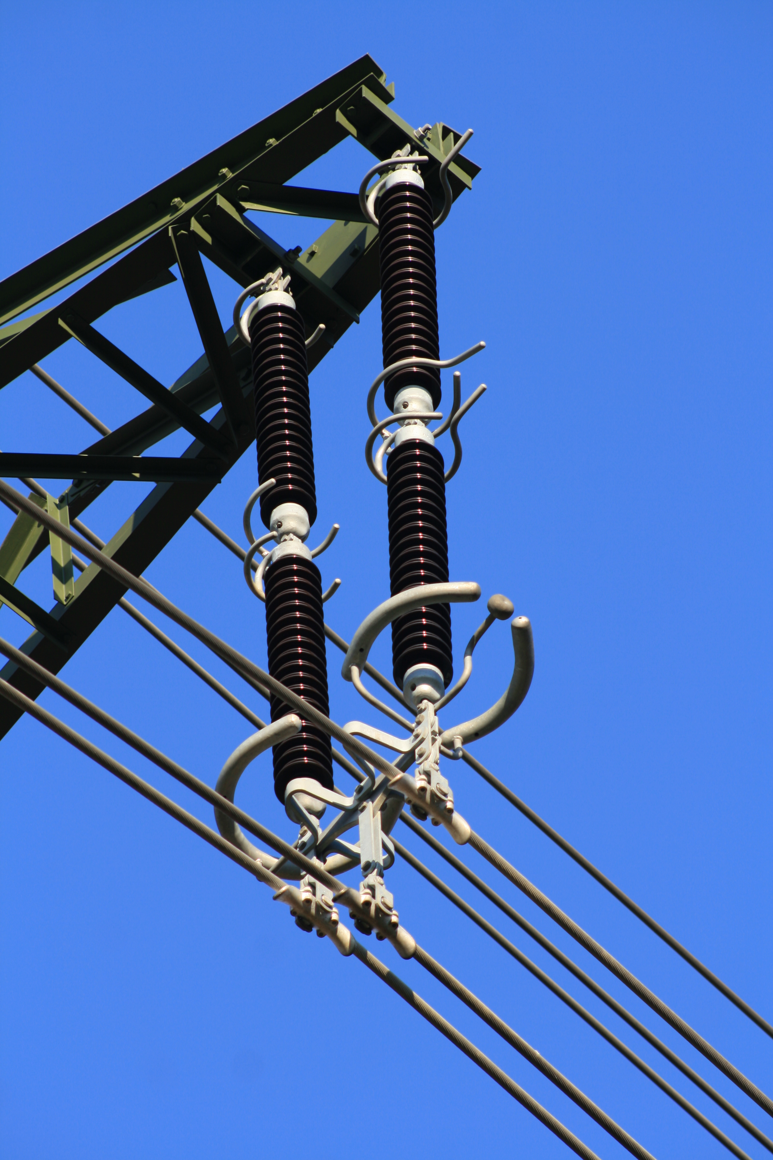 380-kV-Steiermarkleitung bei Hartberg, Sankt Johann in der Haide, Isolatorkette